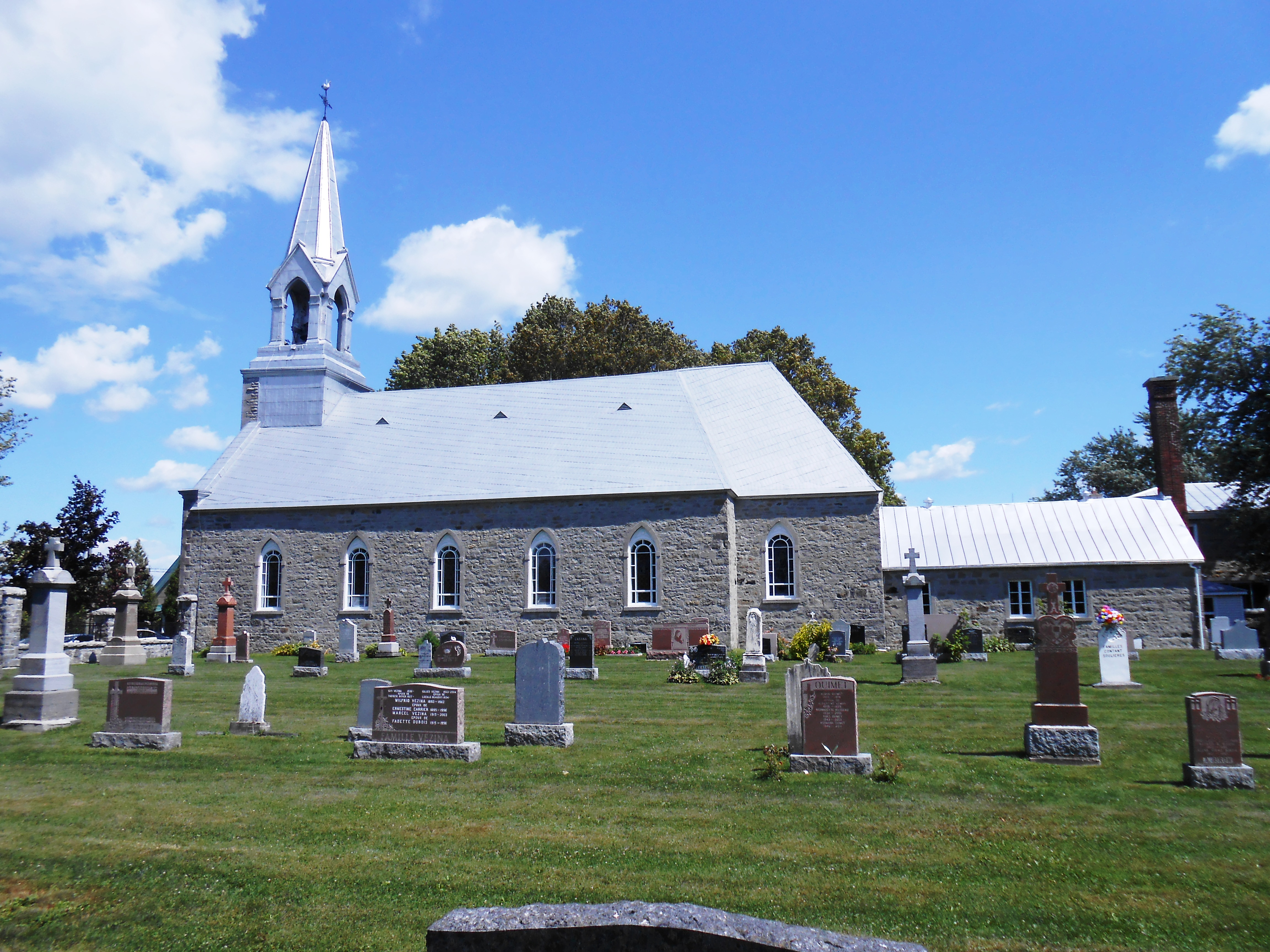 Église Saint-François-de-Sales, 7070 boulevard des Mille-Îles, Laval, Québec